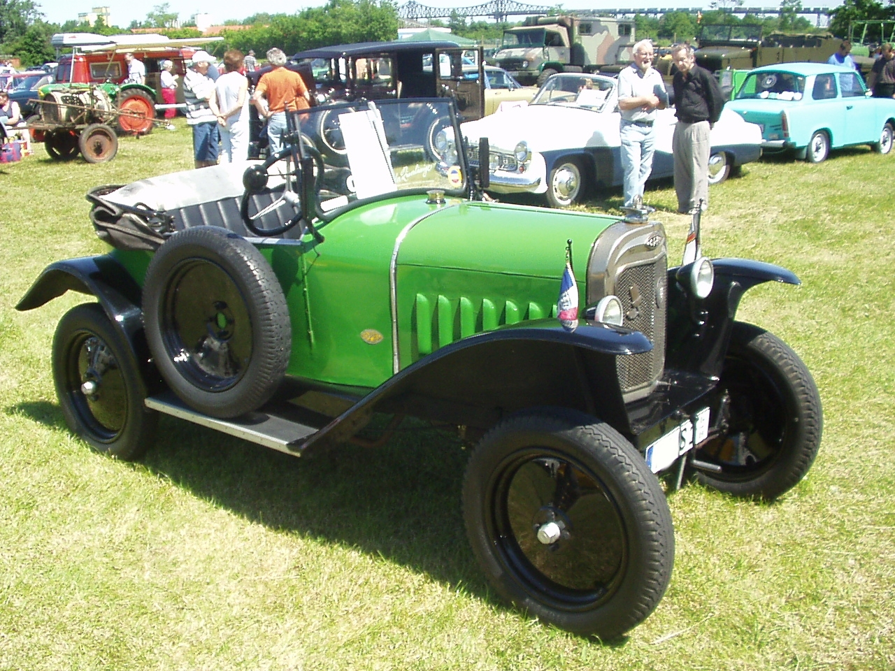 Opel 4 PS "Laubfrosch" offen